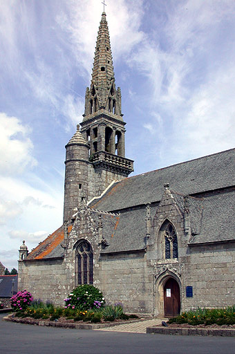 Description : Plougonver (22) - Église Saint Pierre Date : juillet 2004 Auteur : Ifernyen Source : Archives personnelles Statut : GFDL Ifernyen